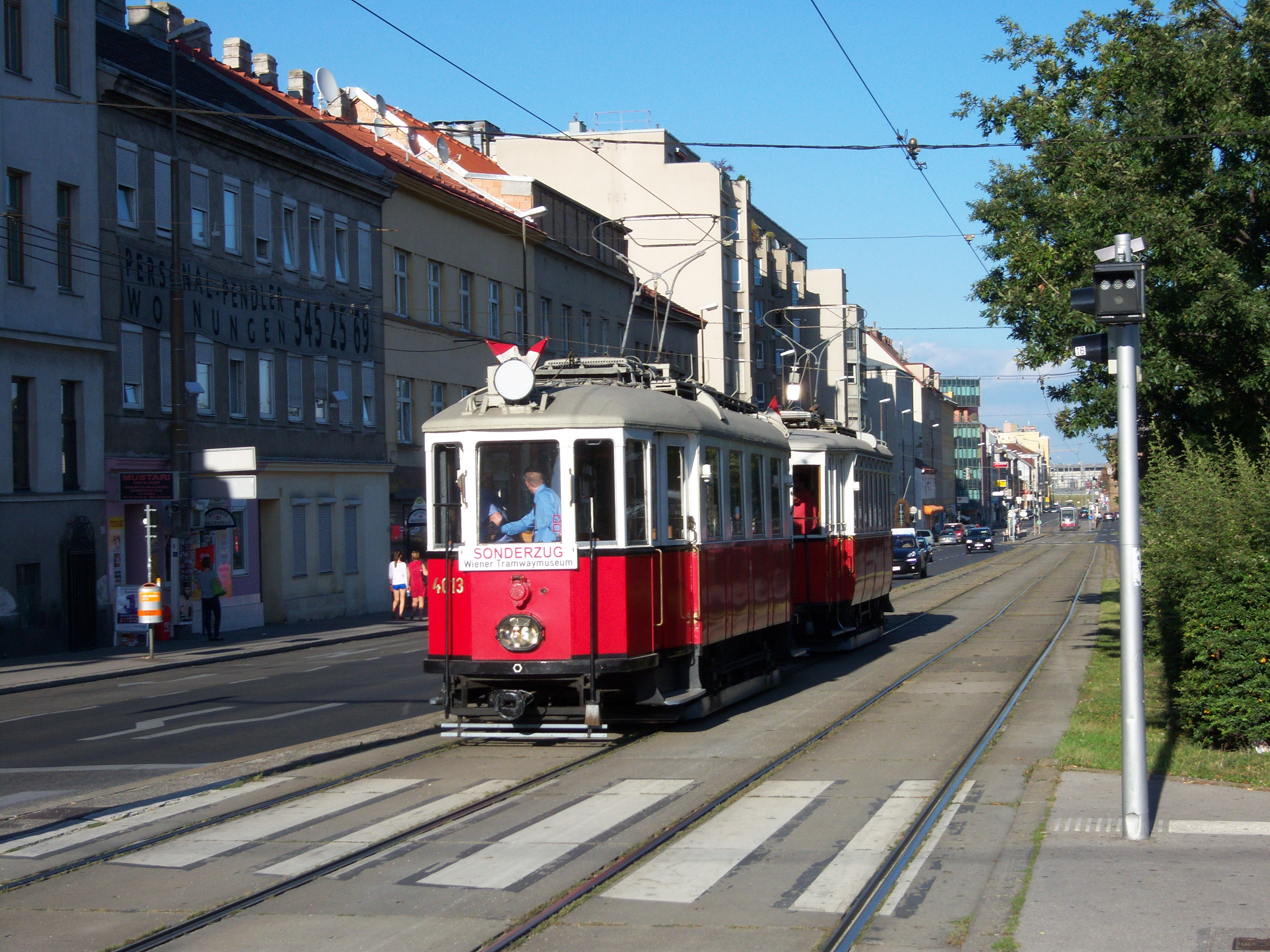 Hundert Jahre alte Straßenbahnfahrzeuge auf der Fahrt vom "Fest der Hundertjährigen" im Wiener Straßenbahnmuseum zum Betriebsbahnhof Speising. Hier auf der Eichenstraße beim Bahnhof Meidling